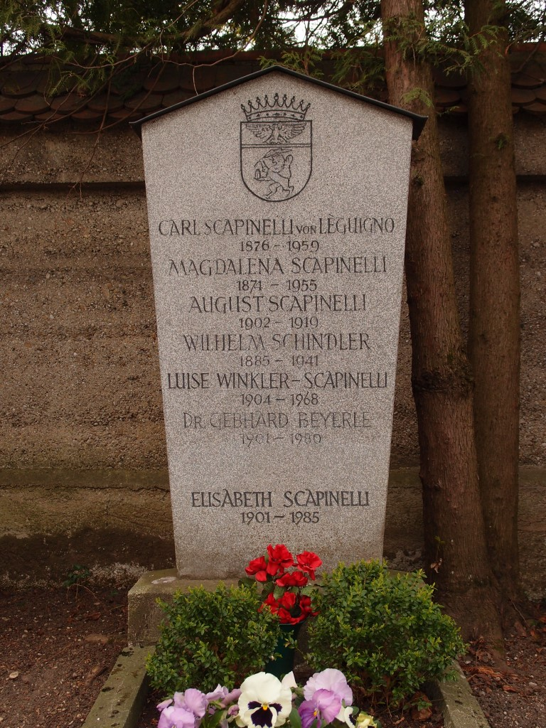 Grab des Schriftstellers Carl von Scapinelli (1876-1959) auf dem Friedhof Pasing in München.